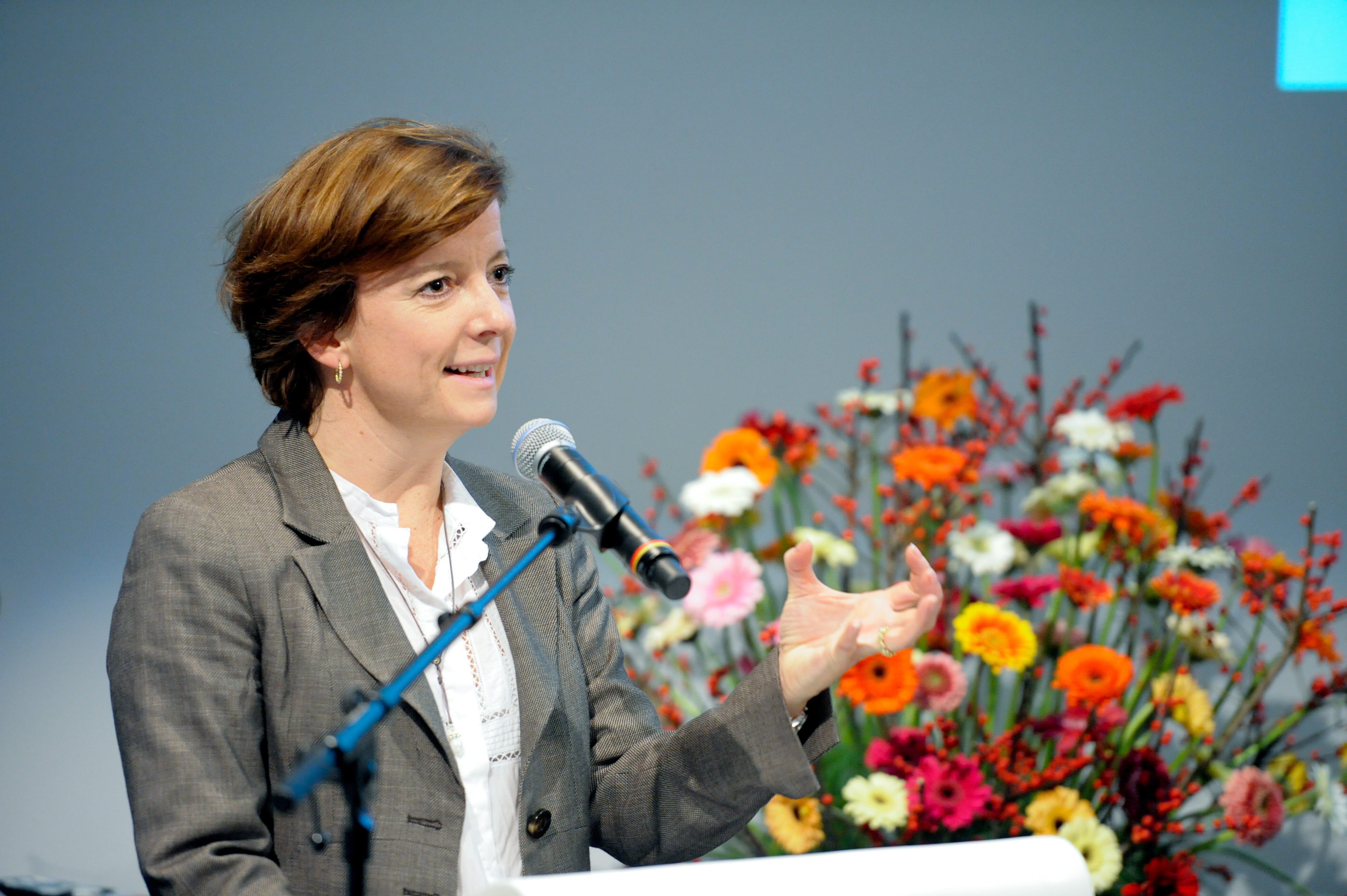 Karen Ellemann, miljö- och nordisk samarbetsminister Danmark. Konferens om lagstiftningssamarbete i Norden 16-17 november 2010